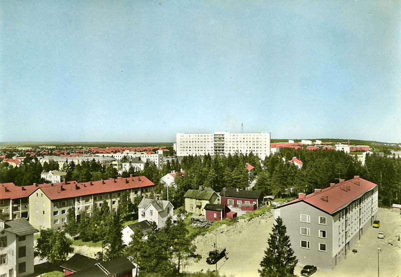 Utsikt över Umeå. Handkolorerad variant av ac01062.; Miljöer; Stadsmiljö